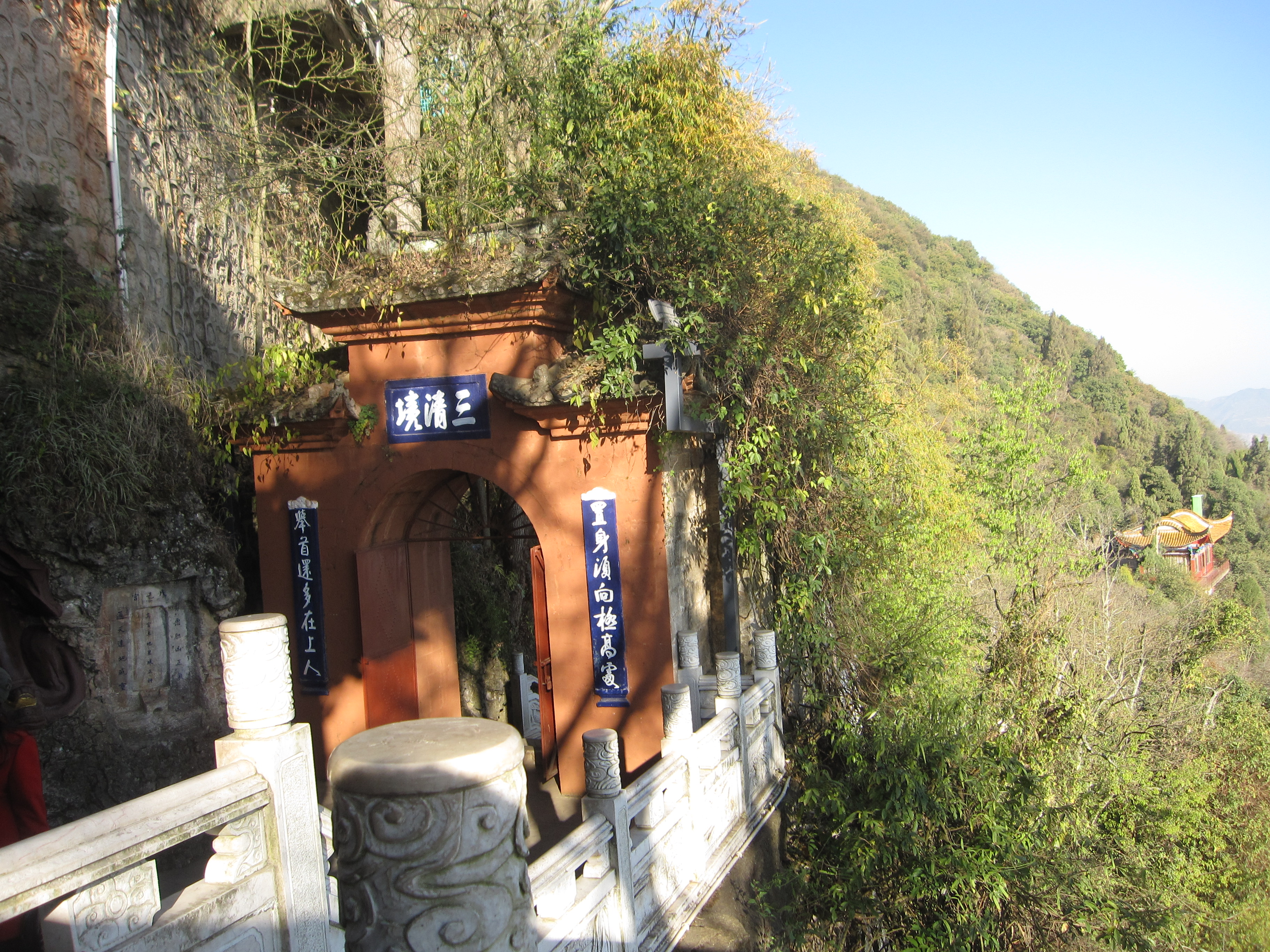 Khu Tây Sơn - Côn Minh